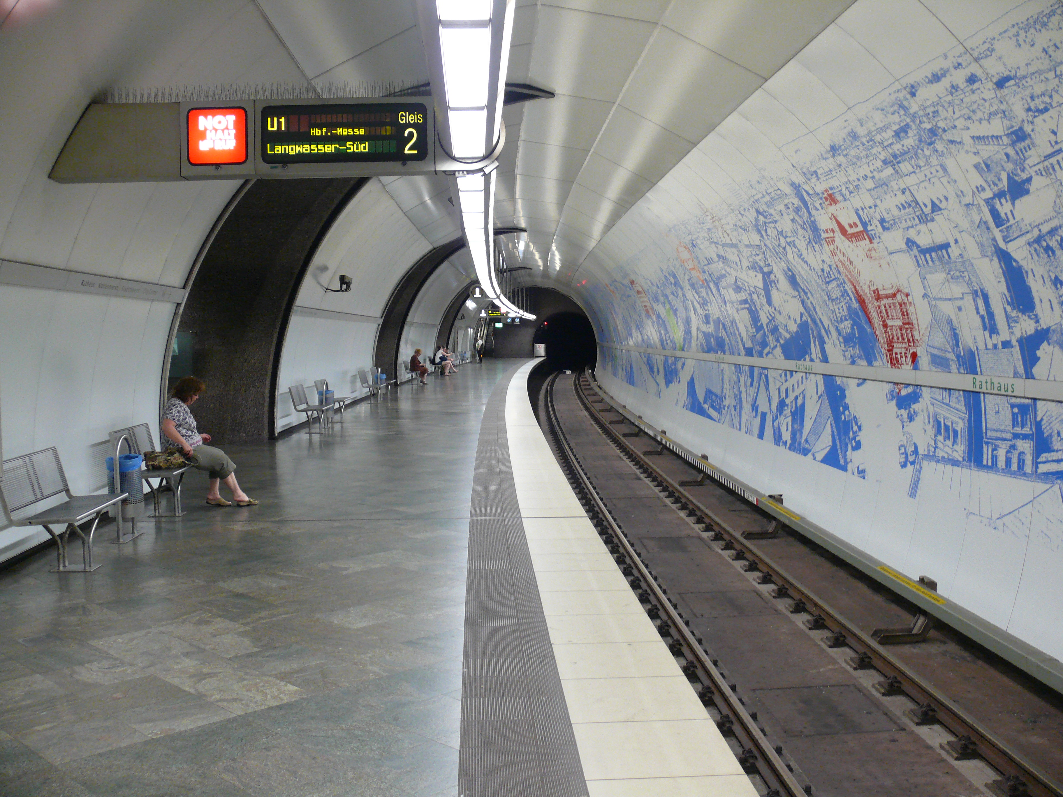 Bahnsteigebene am U-Bahnhof Rathaus in Fürth. Hier die Röhre Richtung Nürnberg.